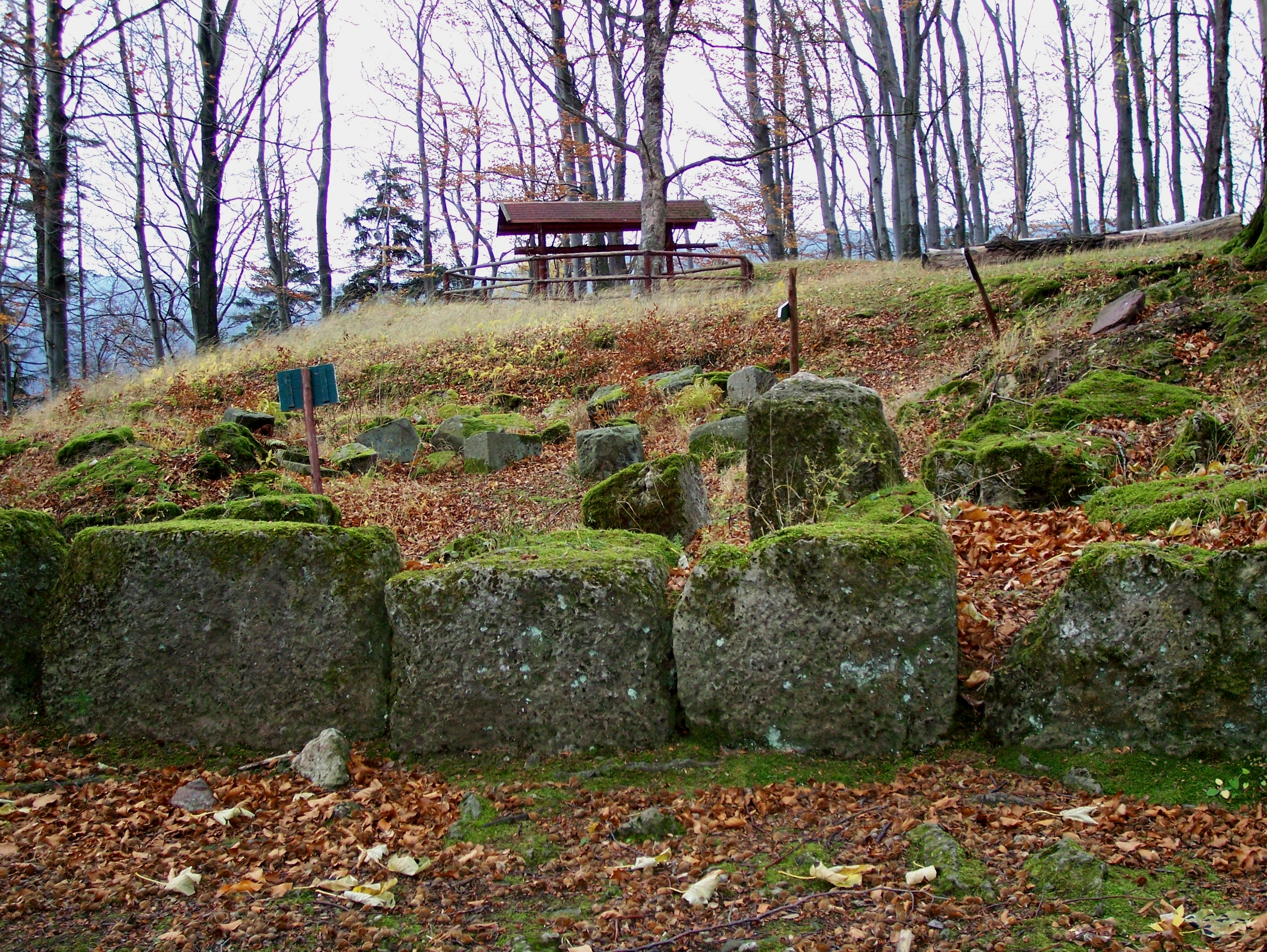 Ruine der Raubritterburg in Dörrberg bei Gräfenroda (Deutschland).